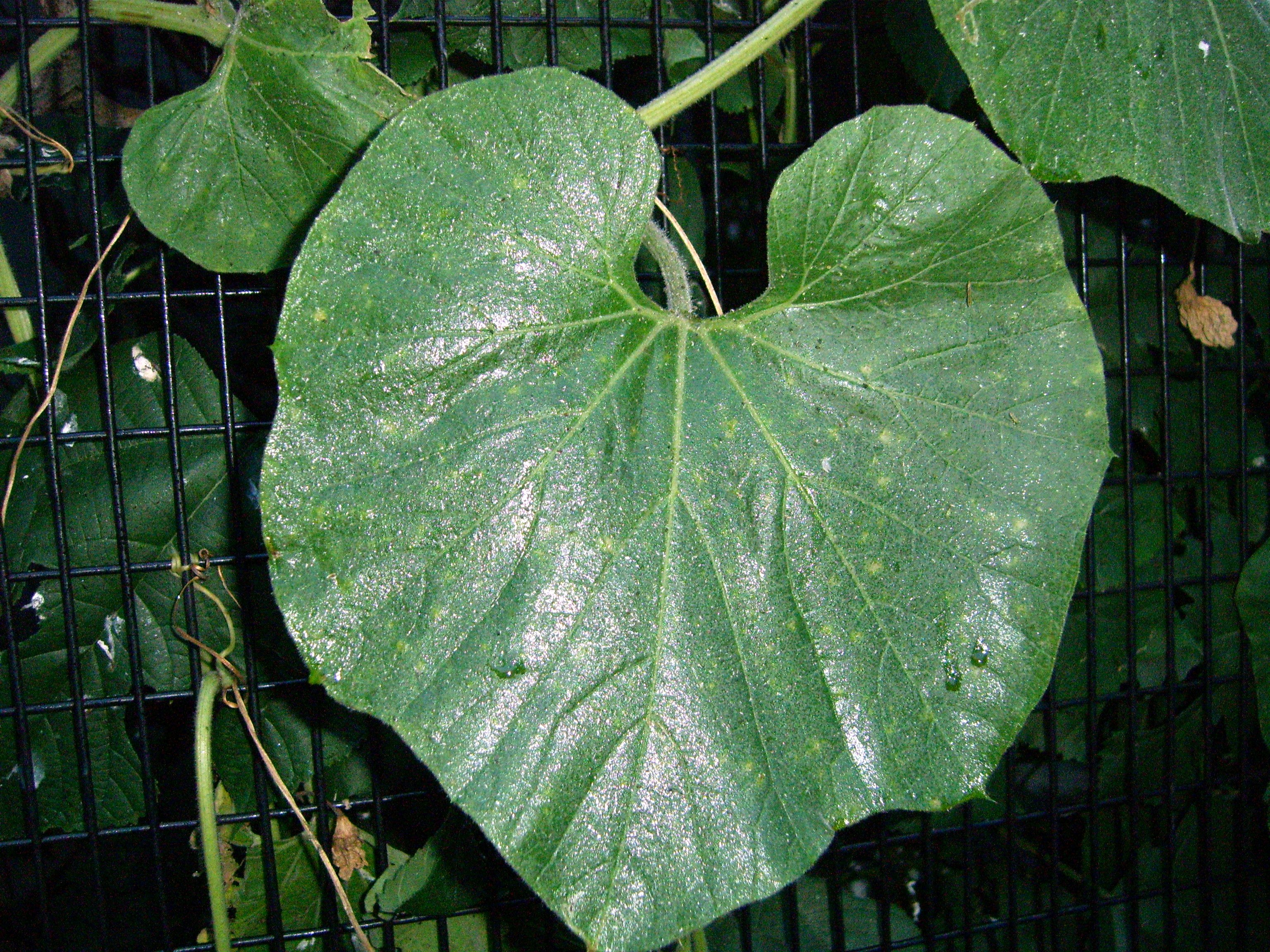 葫芦的叶子